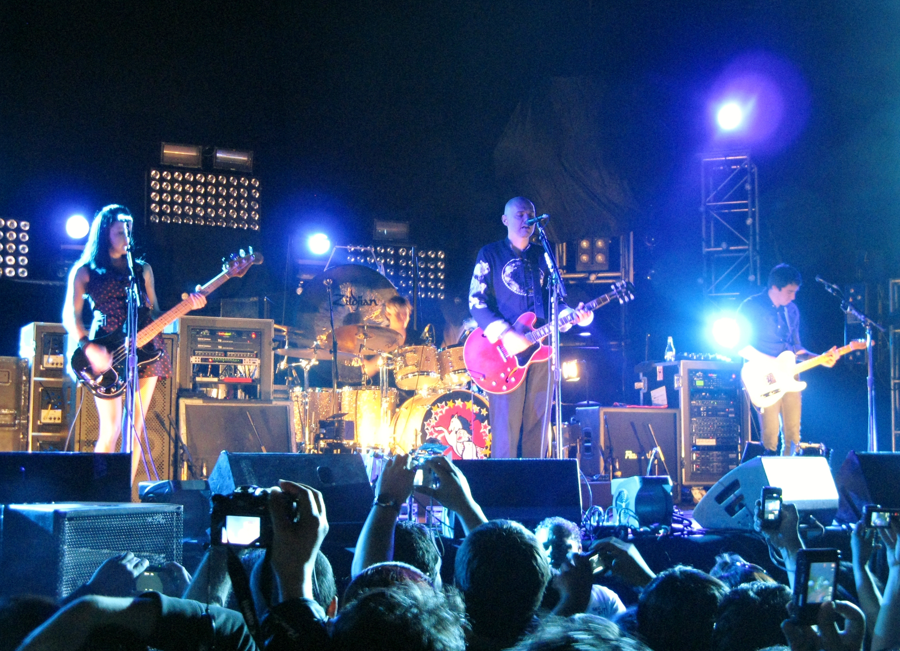 Гурт The Smashing Pumpkins на концерті в Сантьяго